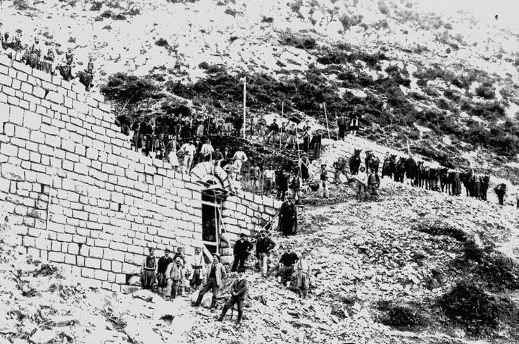 Izgradnja željezničke pruge Gabela - Zelenika kod Sutorine